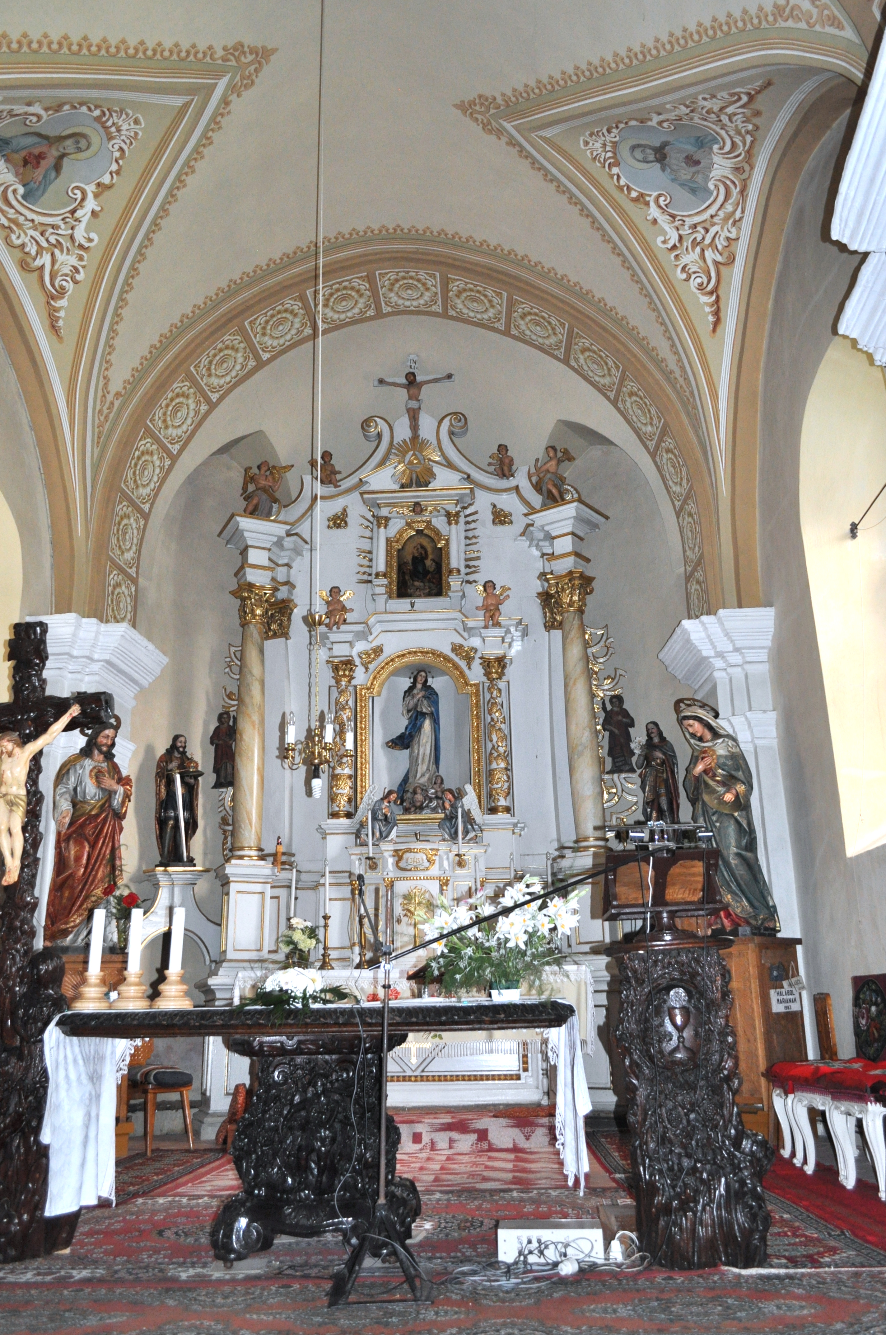 Lăzarea, județul Harghita